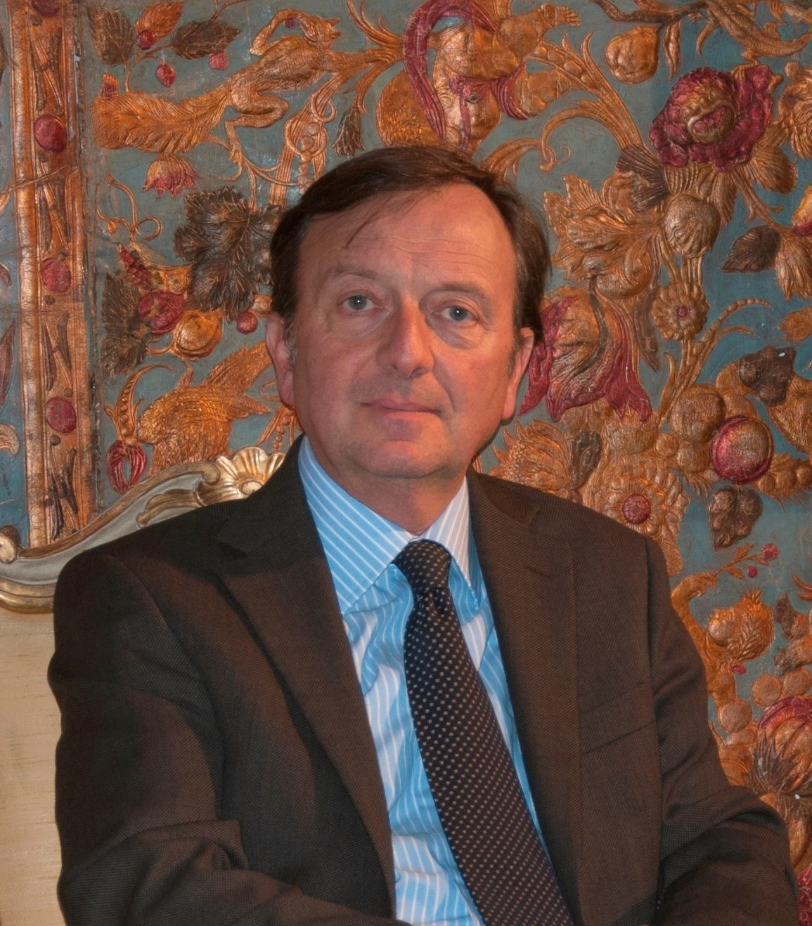 Francesco Petrucci, storico dell'arte